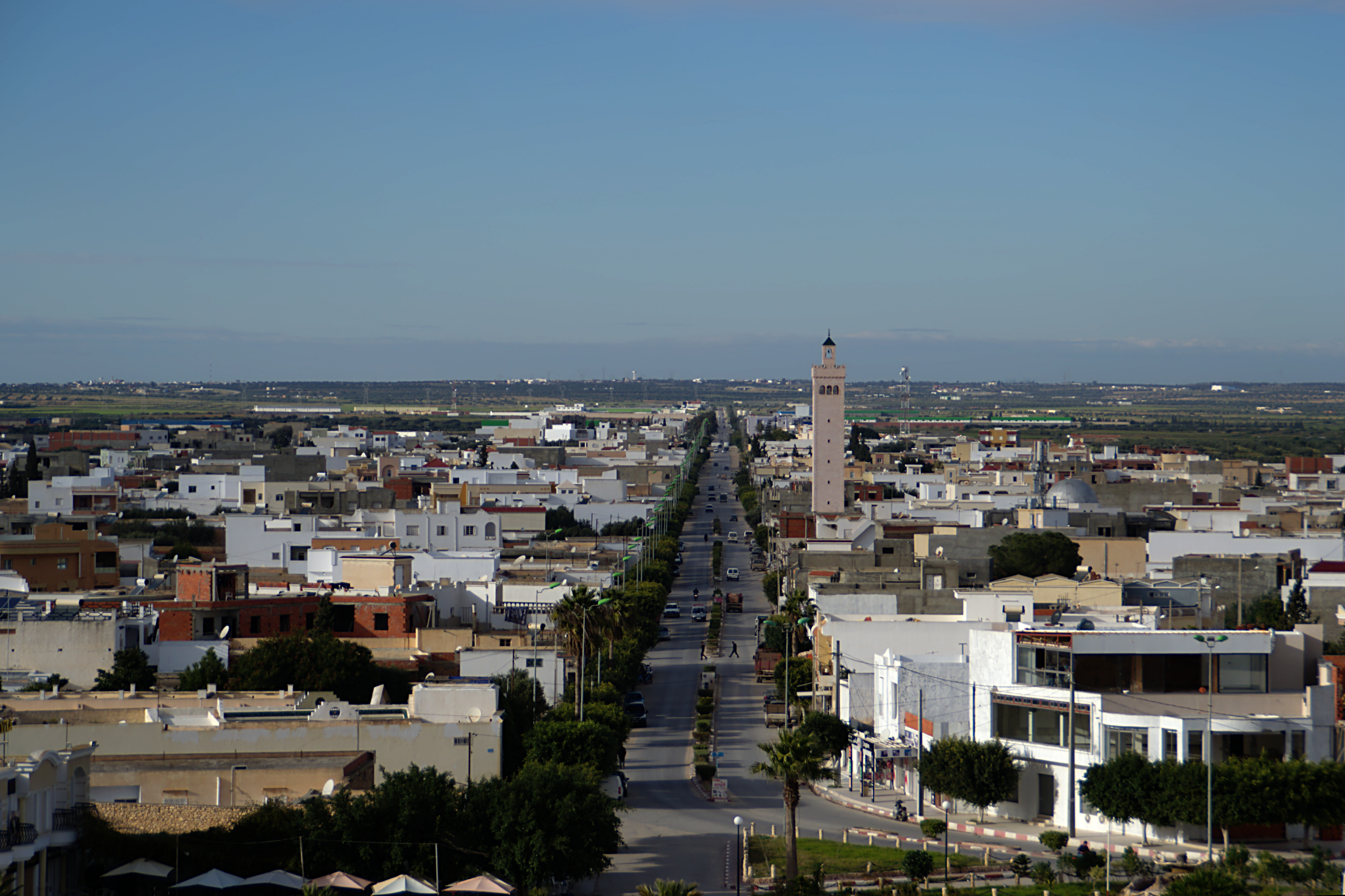 Vue de la ville d'El Jem depuis l'amphithéâtre romain